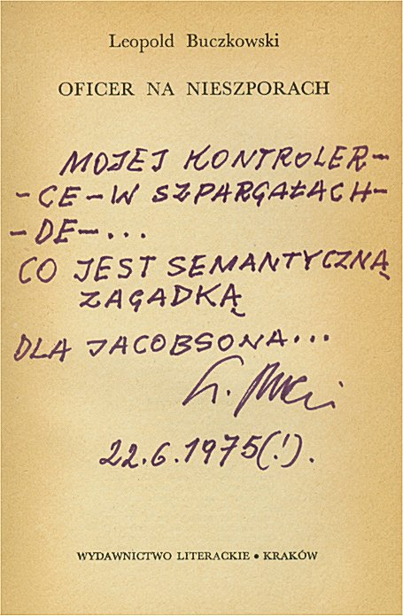 Leopold Buczkowski(1905-1989)'s autograph